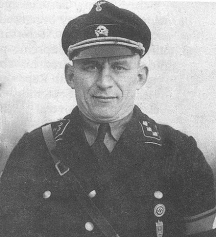 Paul Otto von Radomski avec le grade d'un SS-Untersturmführer, photo prise entre le 20 avril 1934 et le 20 juillet 1935